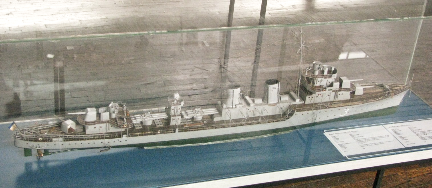 Maketa ratnog broda "Zagreb", Split, 1938, Hrvatska. Tehnički muzej u Zagrebu. Autor makete: Miljenko M. Sindik